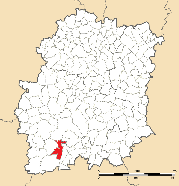 Carte de position de Saclas en Essonne (91)